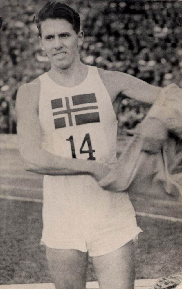 Hjalmar Johannesen avbildet på Stockholm stadion i 1935, like etter målpassering på 800 m, der ny norsk rekord på 1.52,1 ble satt og svenskene ble slått.